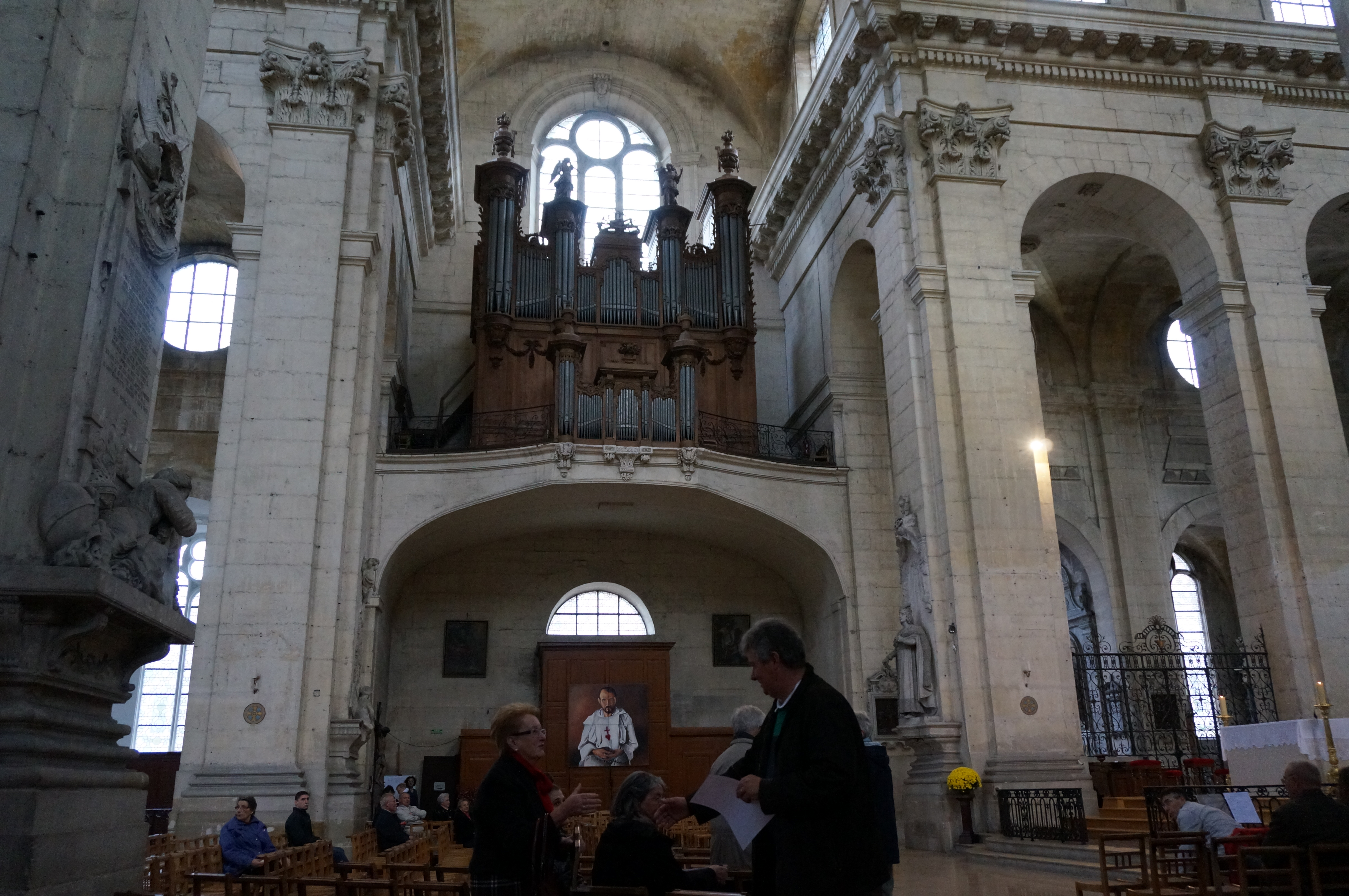 orgues de tribune Collégiale Notre-Dame de Vitry-le-François.